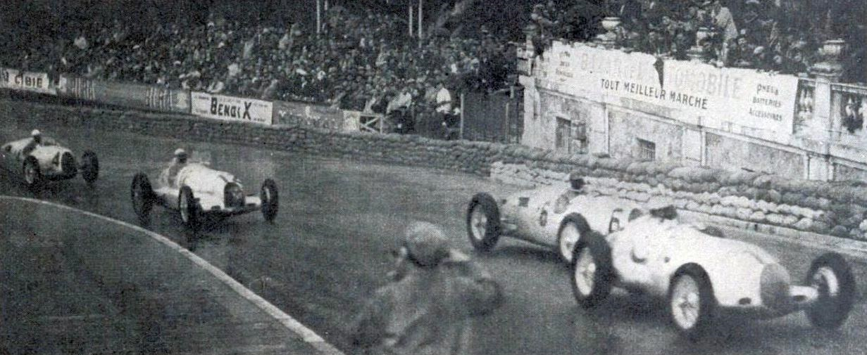 Grand Prix de Monaco 1936 après le départ, Chiron en tête sur Mercedes.